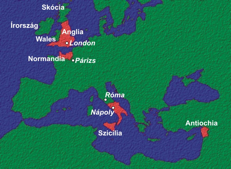 A normannok által elfoglalt területek térképe